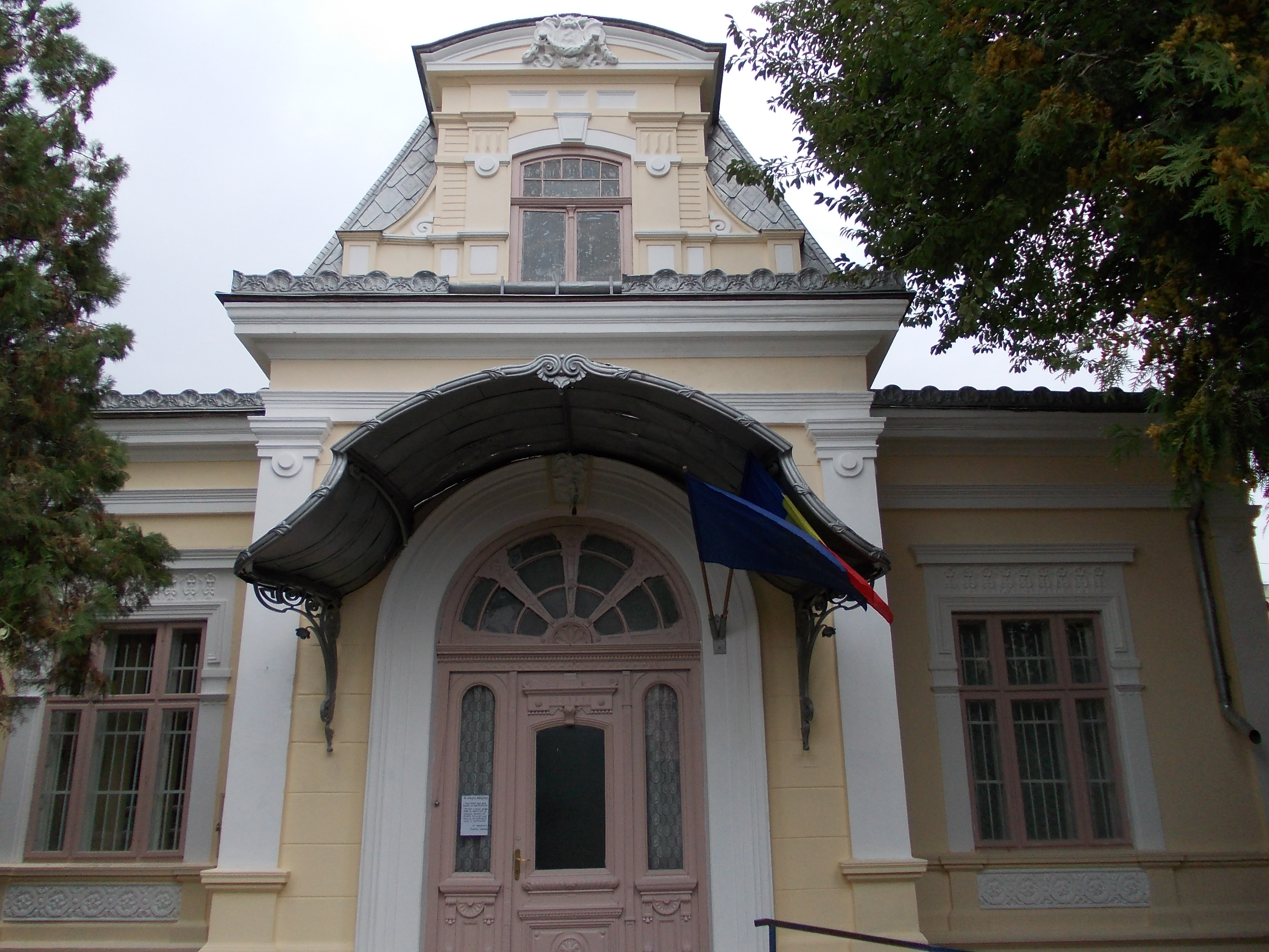 Casă, azi Grădiniță cu program normal